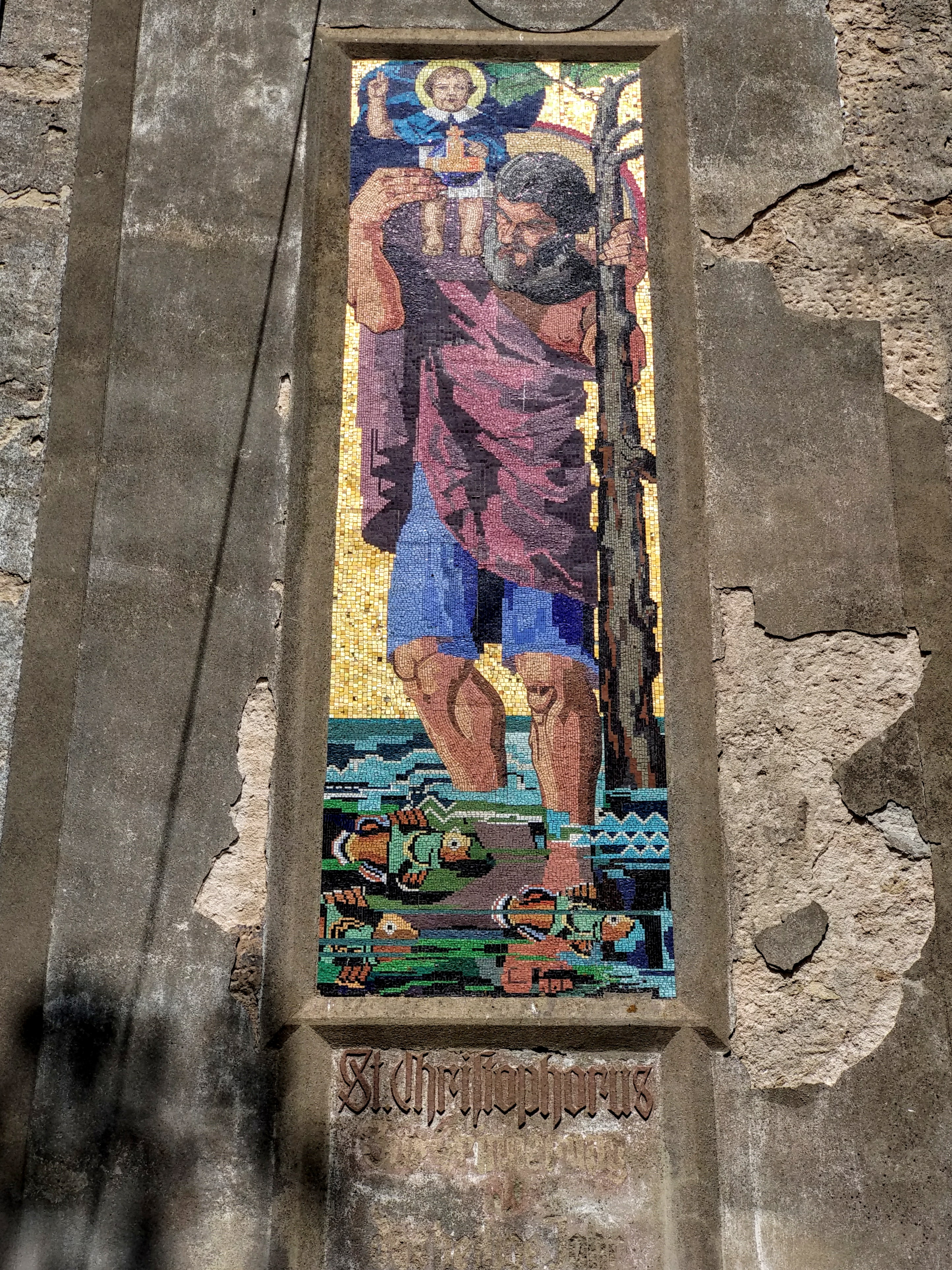 Mozaika sv. Kryštofa